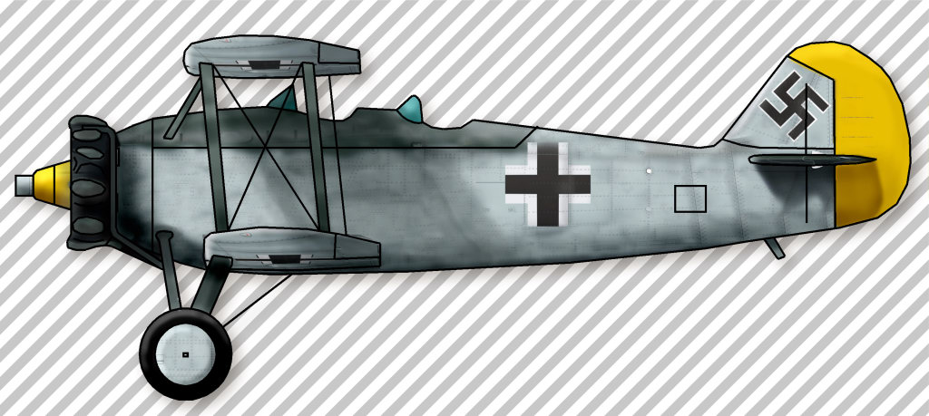 vista del fianco di un Heinkel He 50